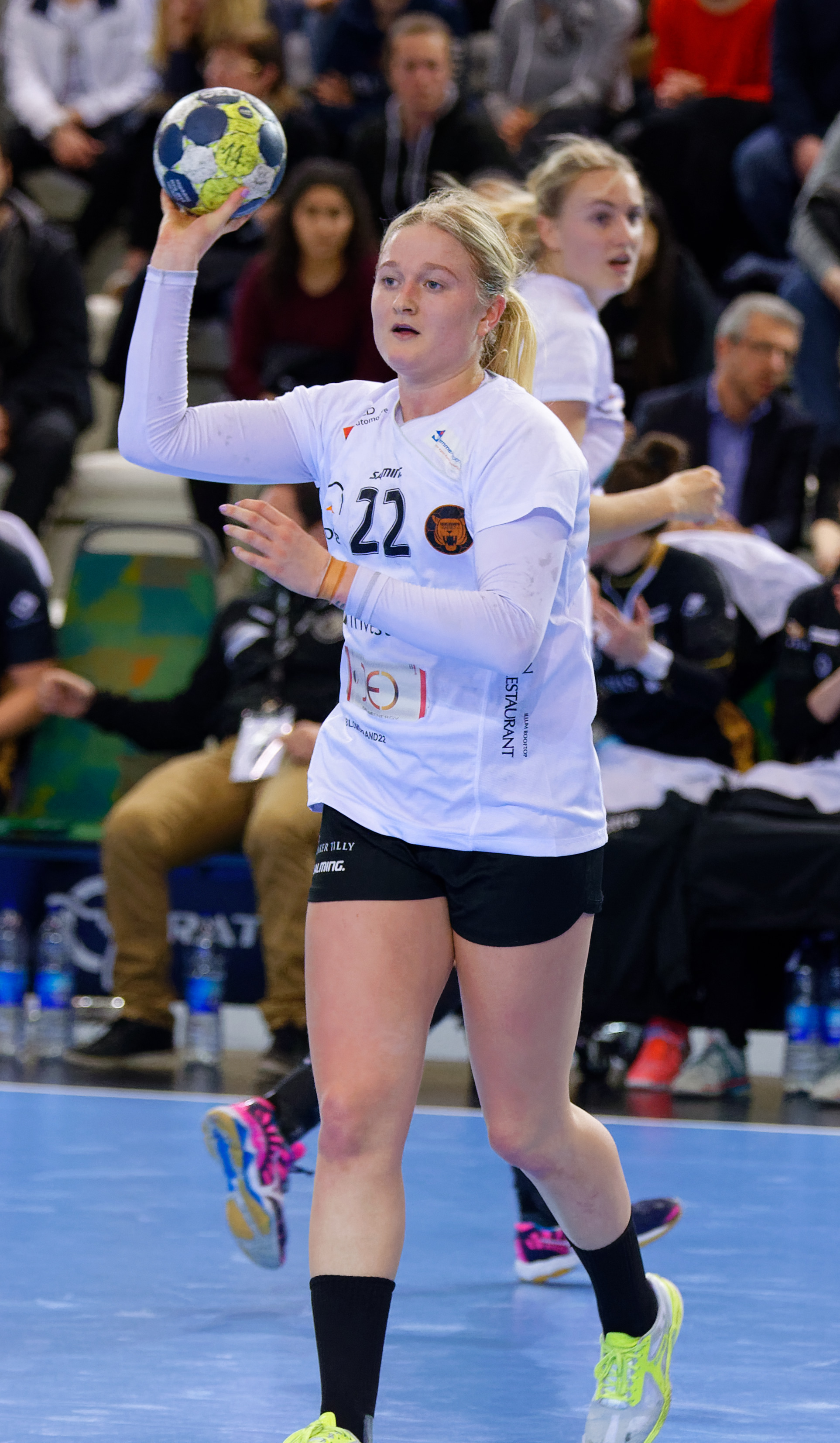 Rencontre du tour principal de la coupe EHF entre Issy Paris Hand et les danoises de Copenhague. A Issy Les Moulineaux, le 28 janvier 2018.